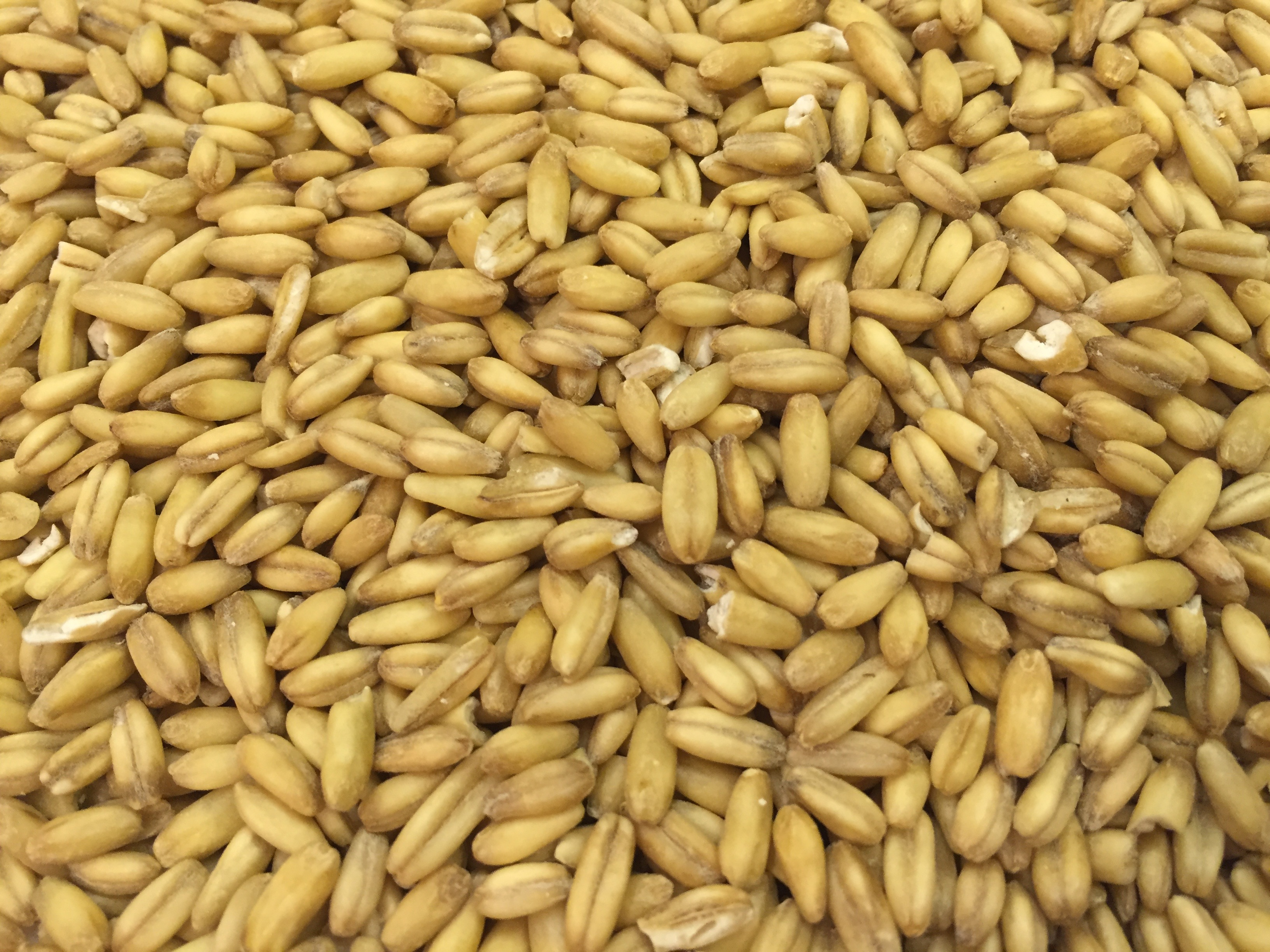 גרעיני שיבולת שועל מלאים שלמים